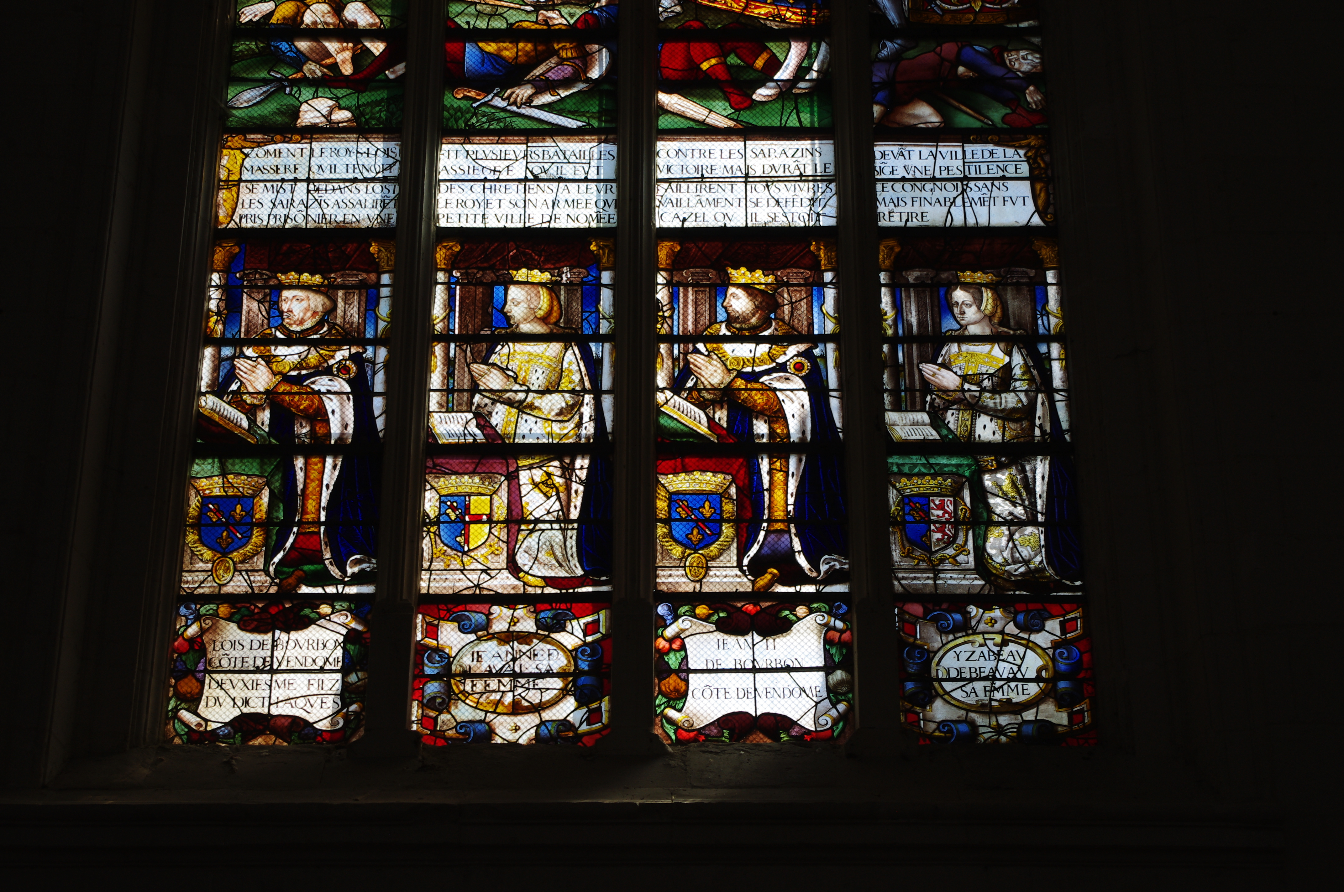 Vitrail renaissance dans la Sainte-Chapelle du château disparu de Champigny-sur-Veude, Indre-et-Loire